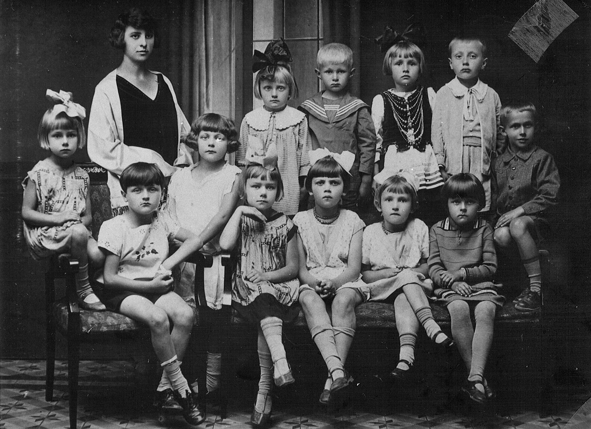 W pierwszym rzędzie siedzą córki p.o. dowódcy batalionu Zdzisława Podgórskiego: trzecia od prawej: Zofia Irena późniejsza Stolarska (1922–1982) i druga od prawej: Zofia Wanda Podgórska (1924–1999)